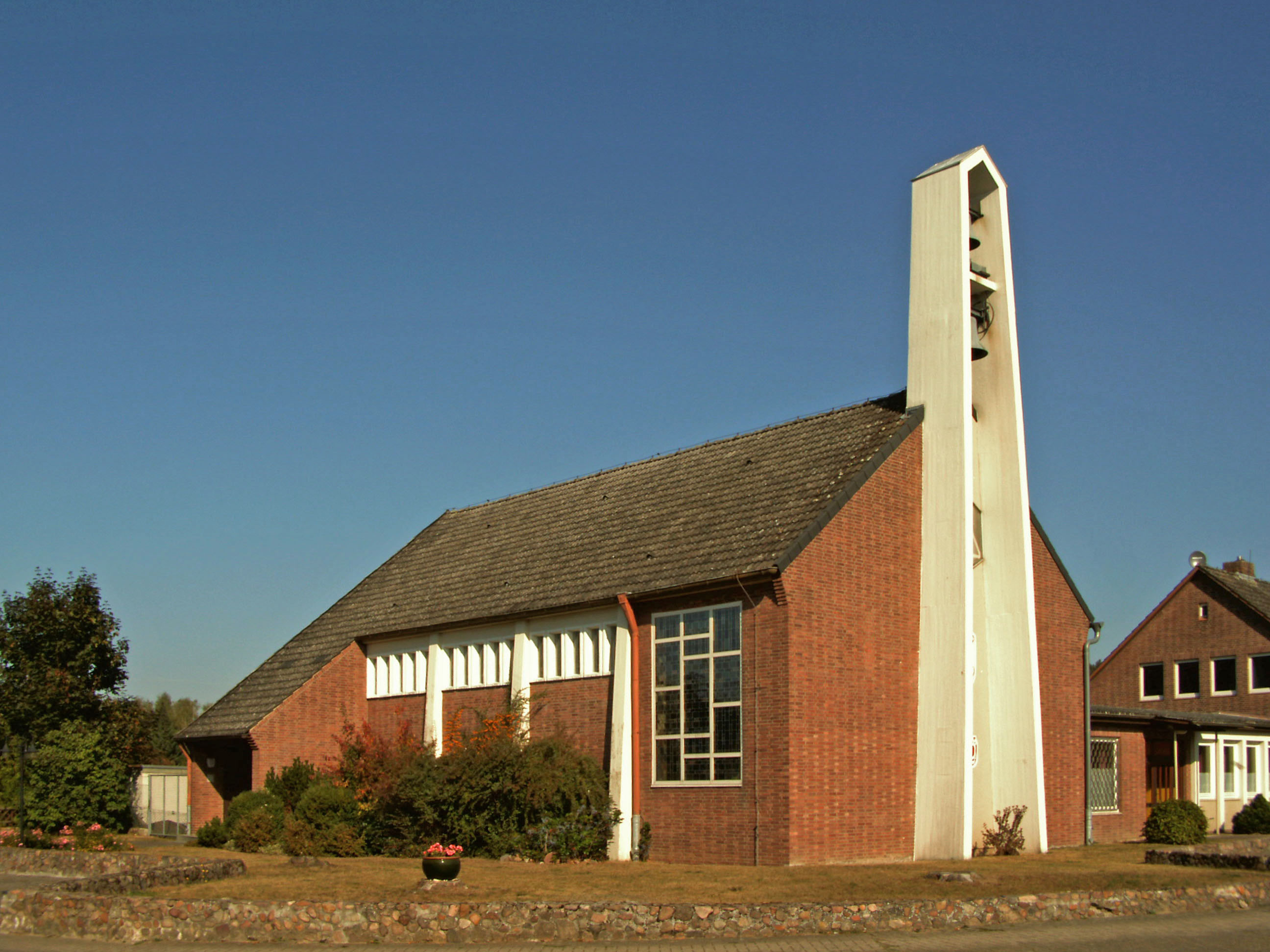 Die 2012 entwidmete, ehemalige katholische Kirche St. Johannes Maria Vianney in Clenze im Landkreis Lüchow-Dannenberg.